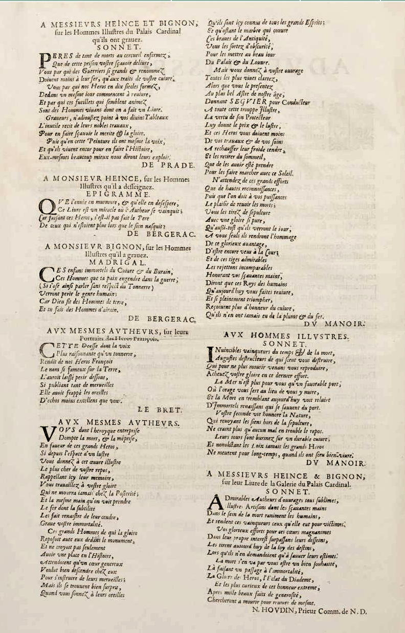 Vulson de la Colombière, Portraits des hommes illustres, 1650, pièces liminaires